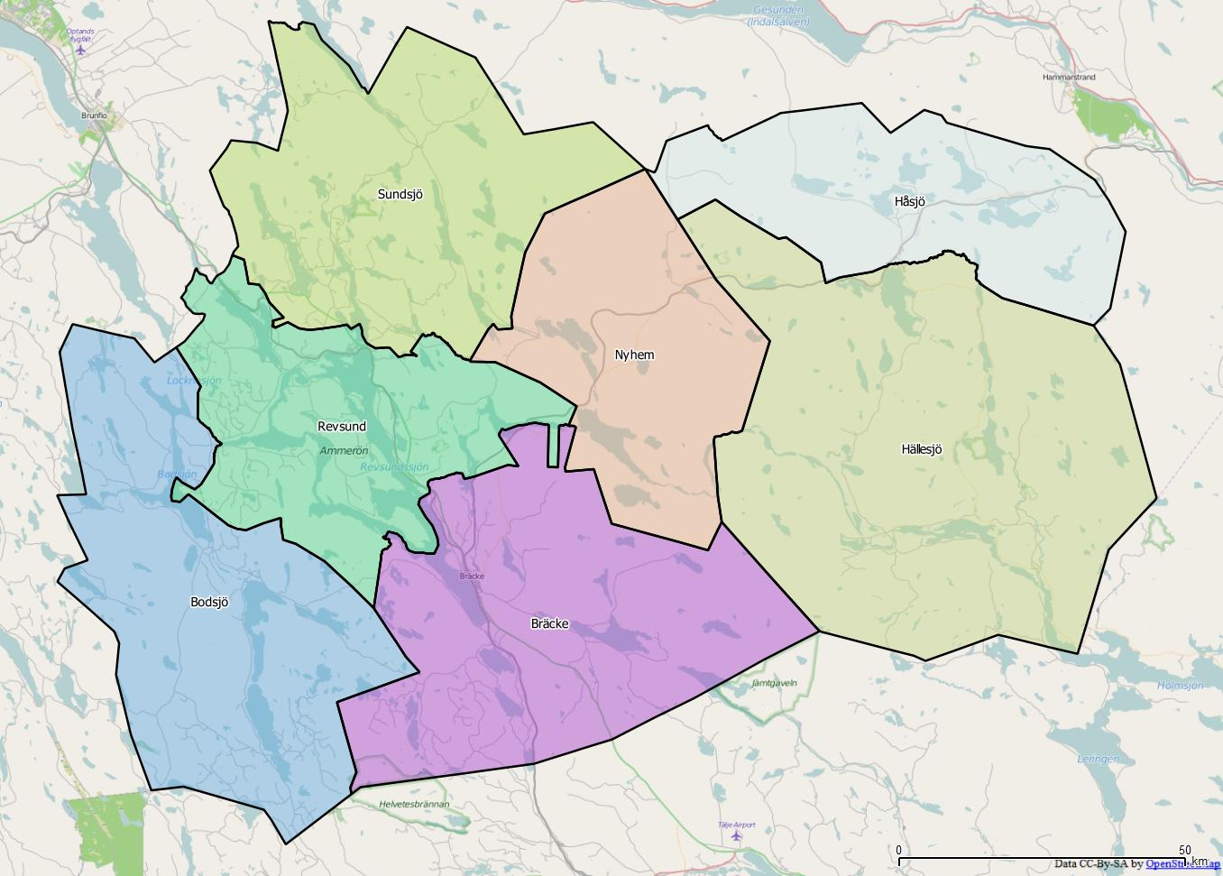 Distriktsindelningen i Bräcke kommun